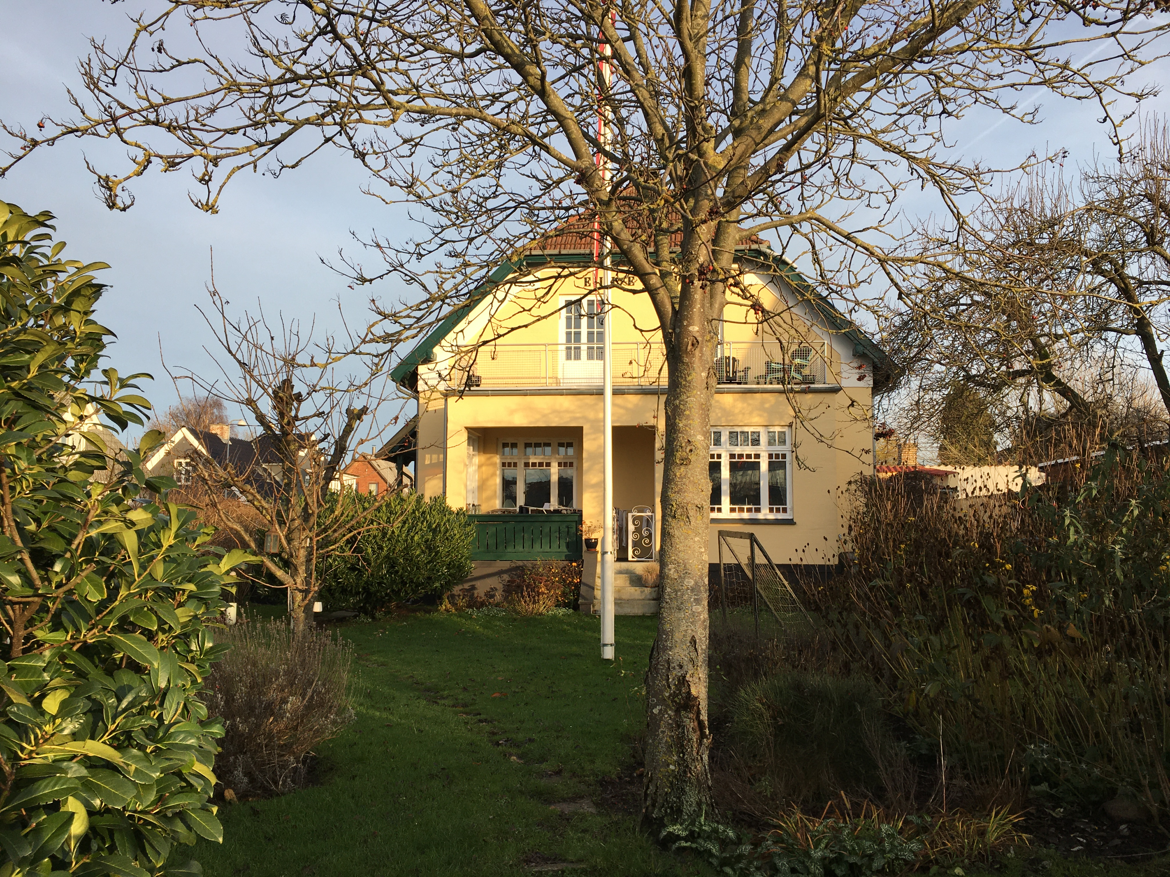 Fixvej 2 i Næstved